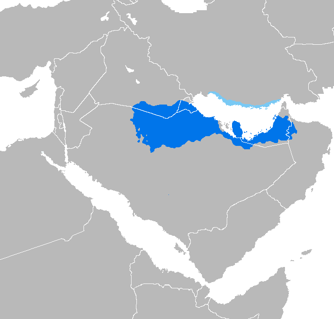 Árabe del Golfo